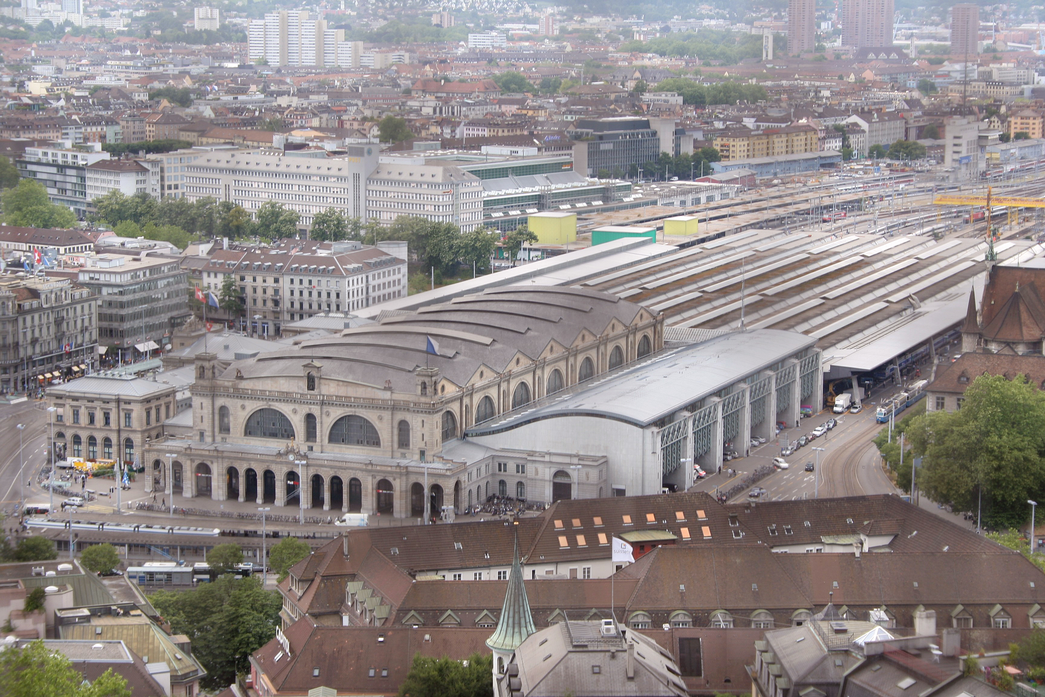 Hauptbahnhof Zürich, Schweiz. Blick durch ein Gitter